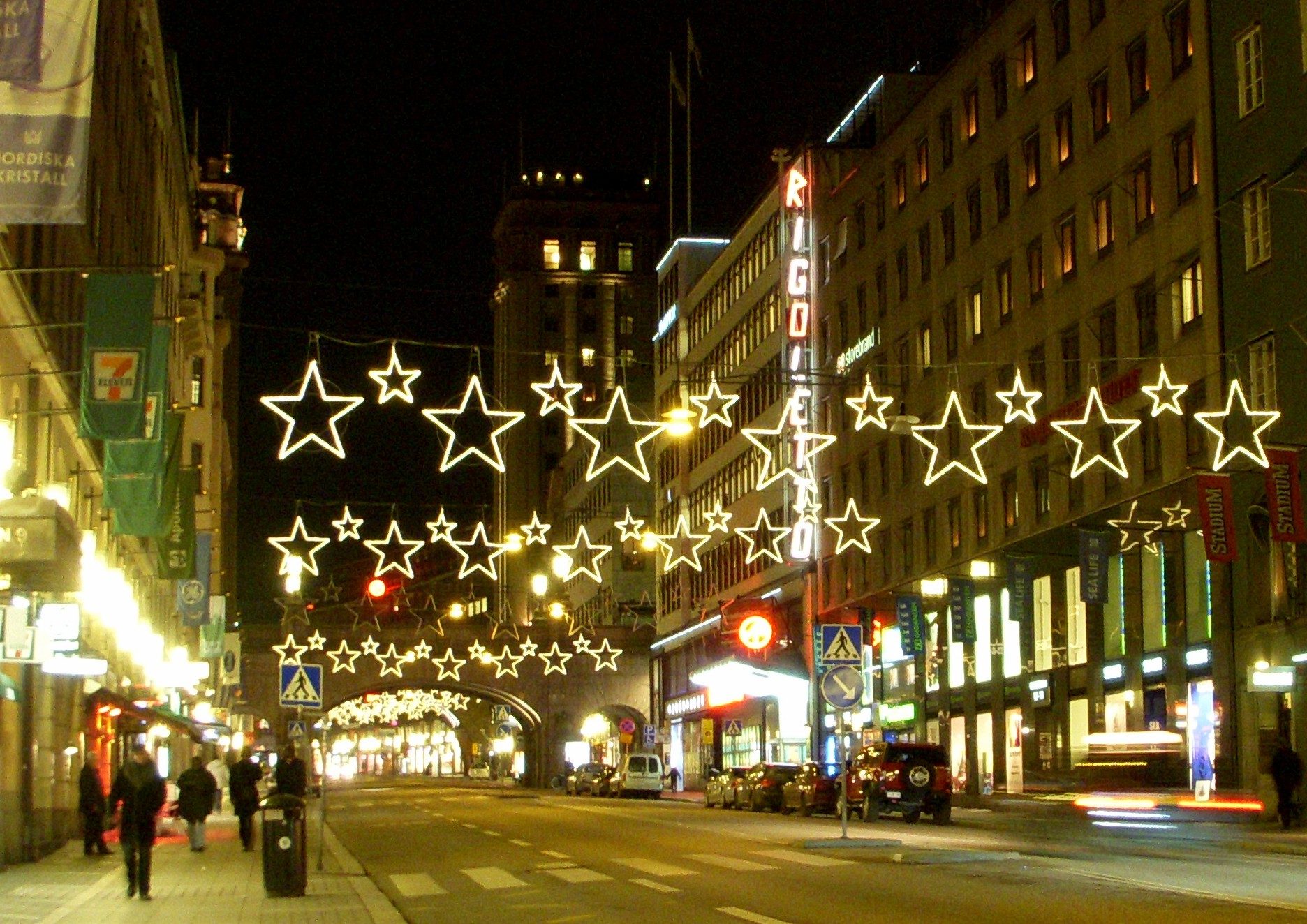 Kungsgatan i Stockholn den 2:a advent 2008